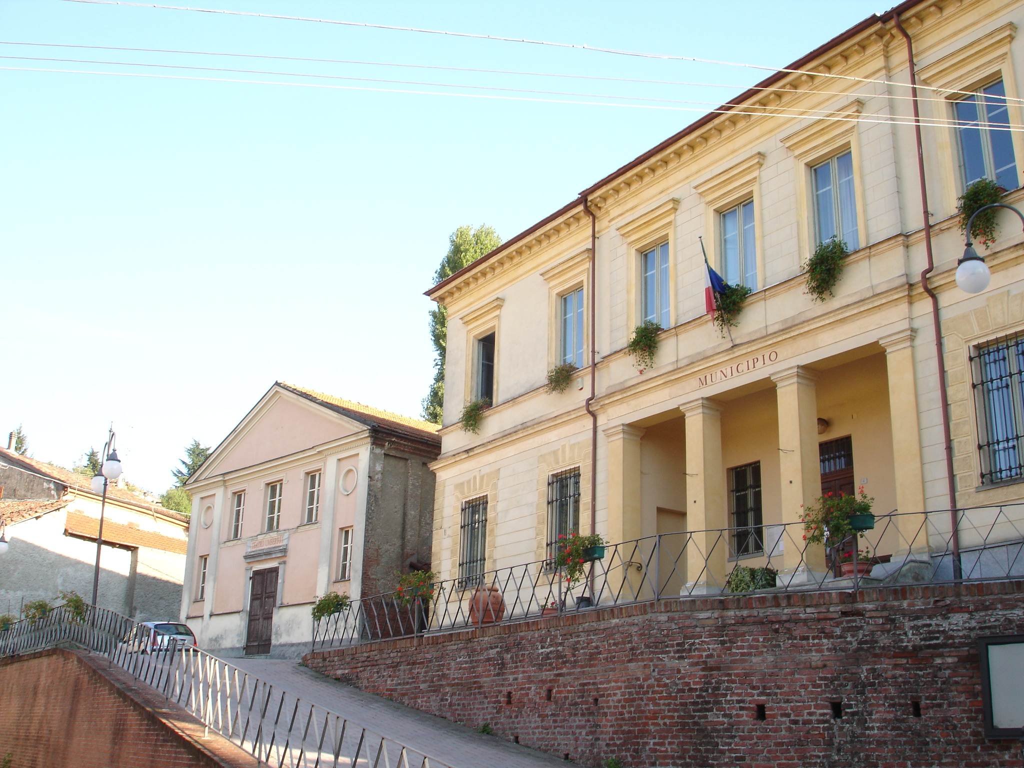 Ricaldone (provincia di Alessandria): il municipio e il teatro "Umberto I"